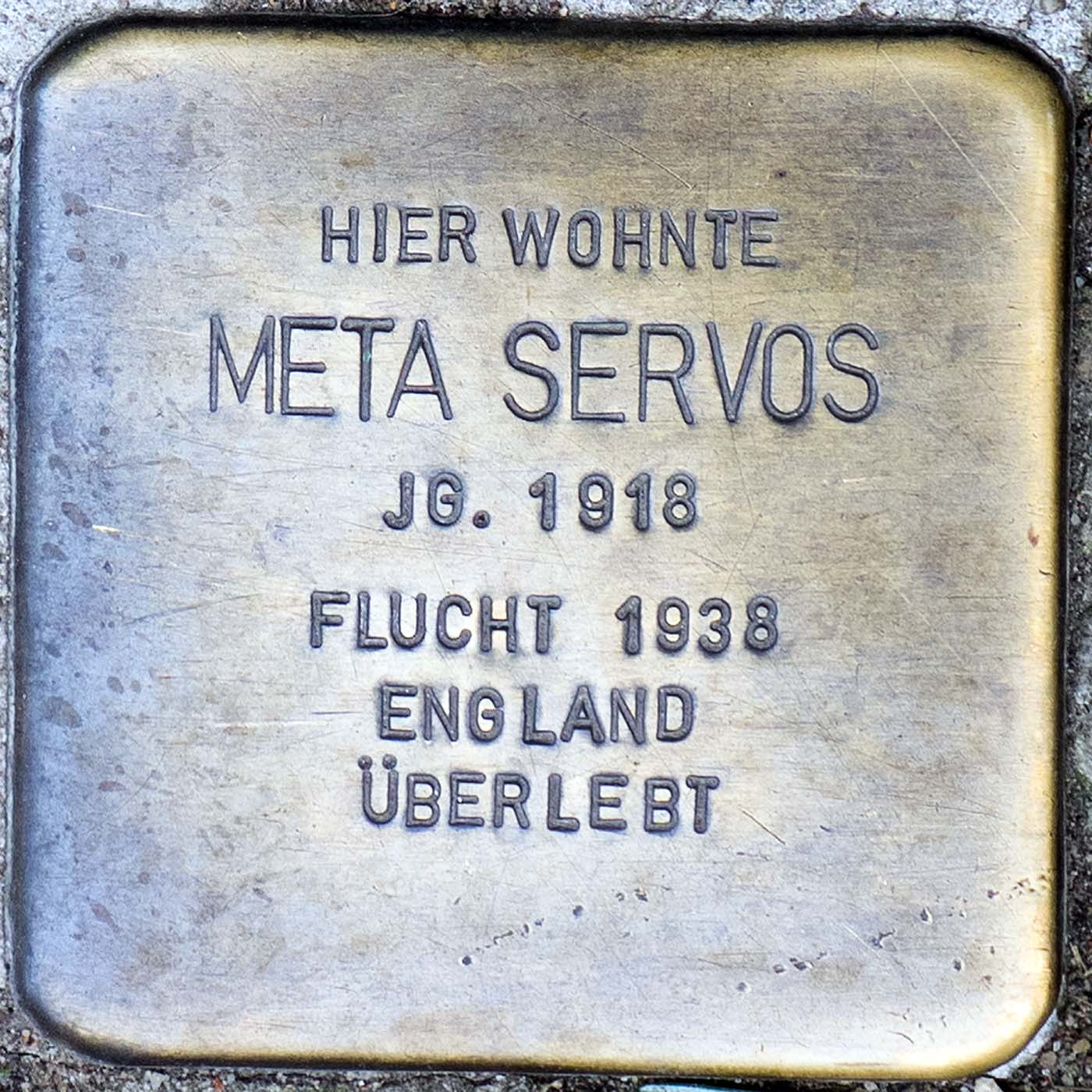 Stolperstein für Meta Servos (Willich)